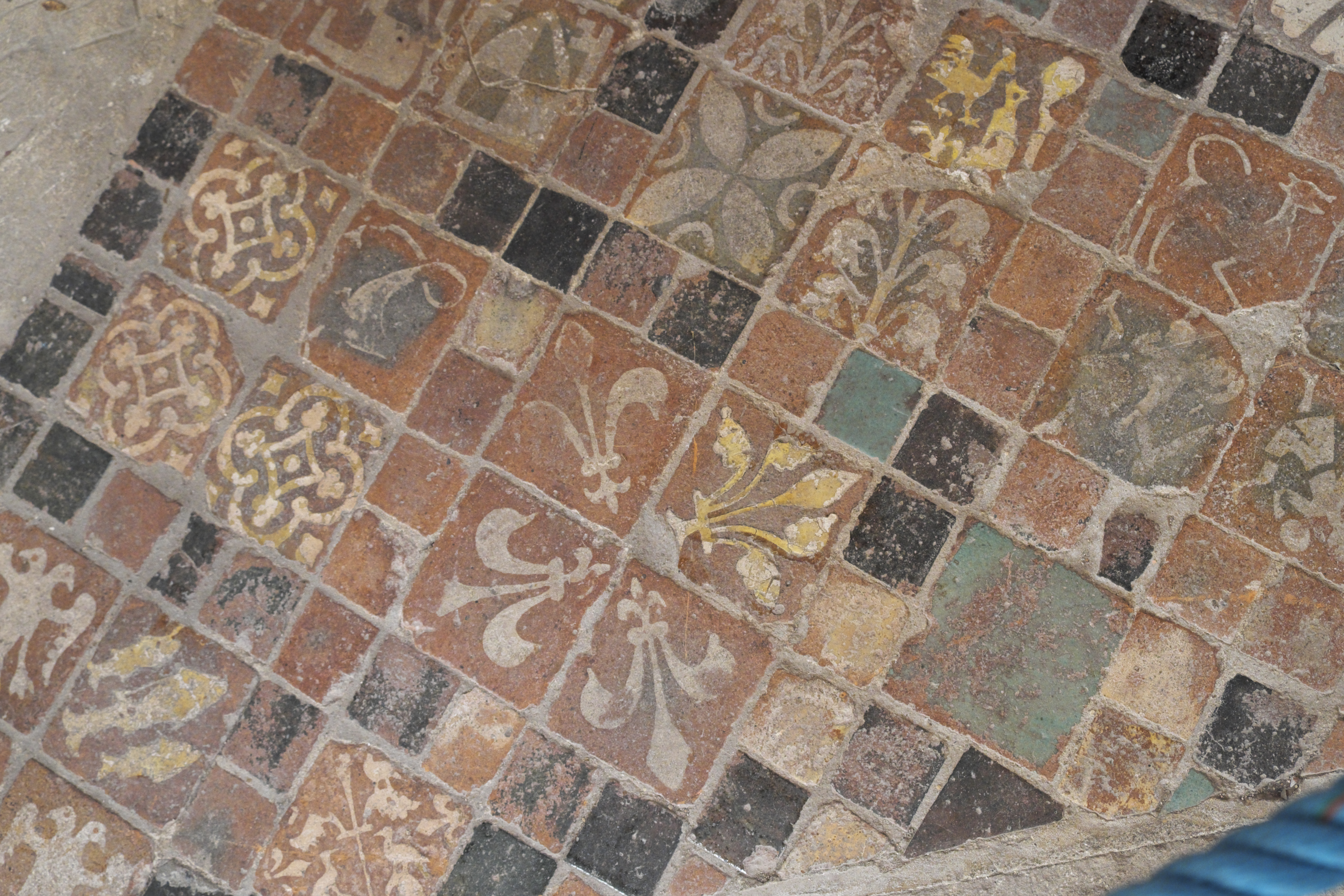 Katholische Kapelle Saint-Léonard, ehemalige Pfarrkirche, in Croissy-sur-Seine im Département Yvelines (Île-de-France/Frankreich), mittelalterliche Bodenfliesen im Chor